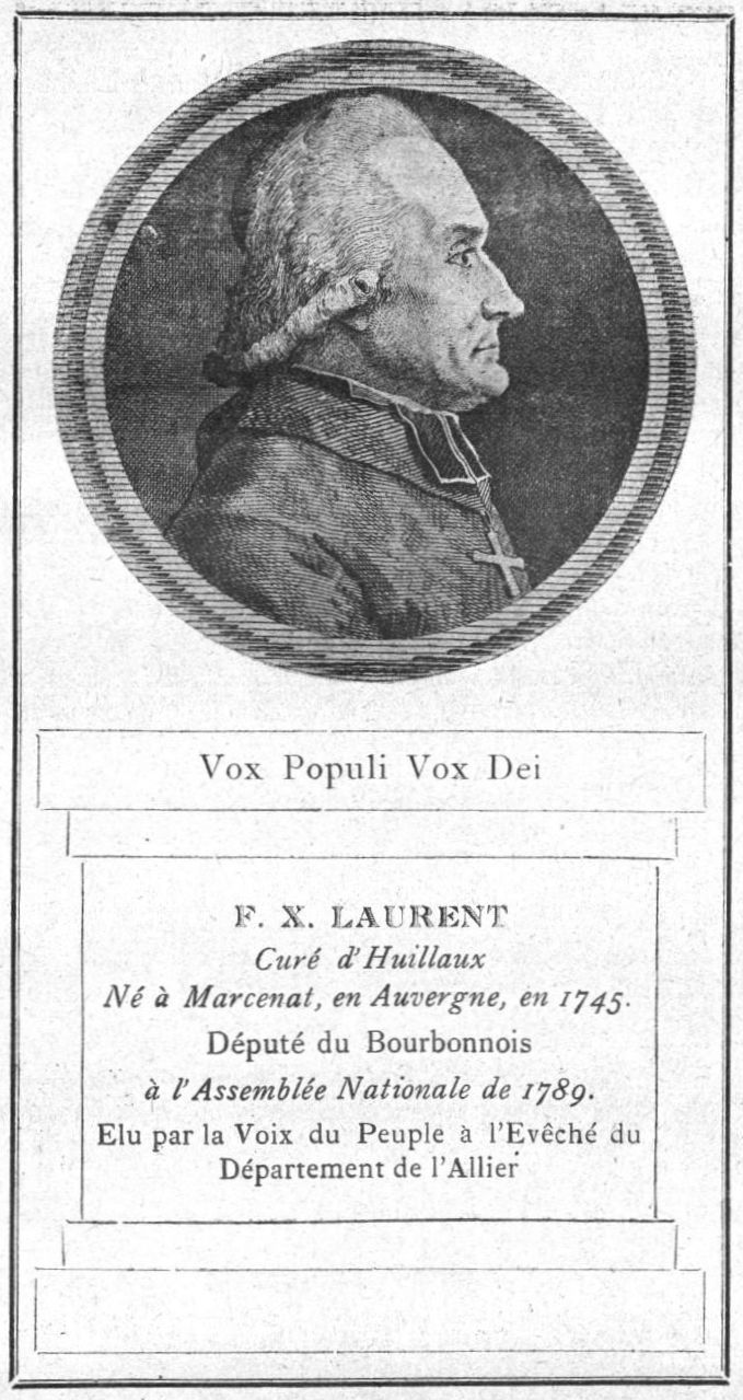 Portrait de François-Xavier Laurent, évêque conventionnel de l'Allier (1789-1793)